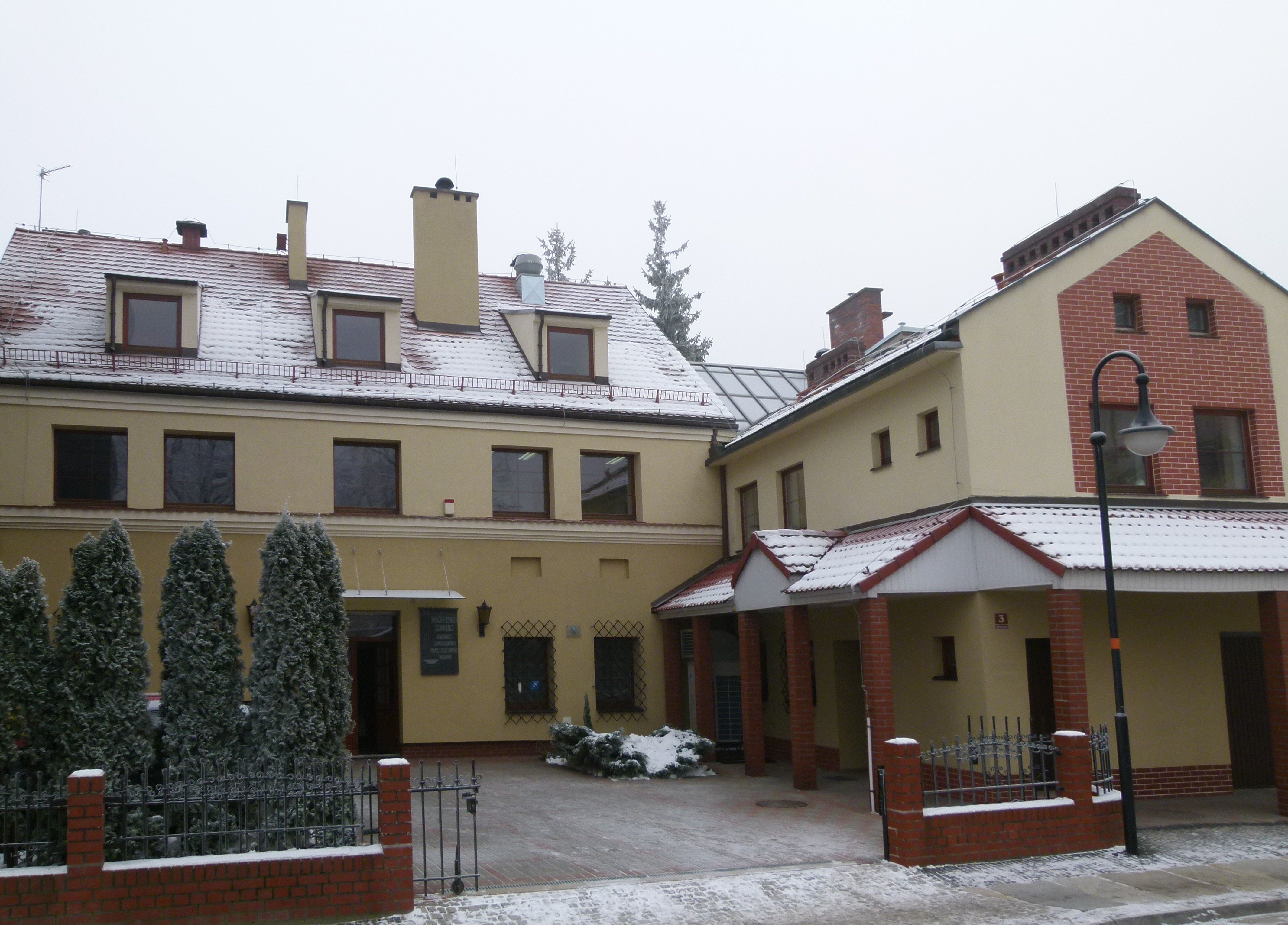 Centralne Muzeum Jeńców Wojennych